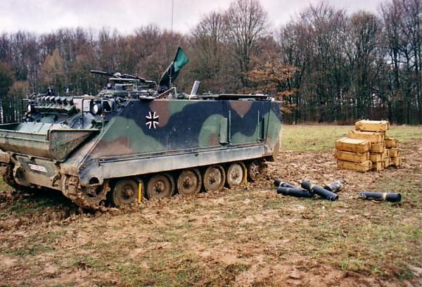 Ein M113_A1_(EFT)_GE 120 mm Mörserträger der Bundeswehr in ausgepflockter Feuerstellung auf dem Truppenübungsplatz der Infanterieschule in Hammelburg.